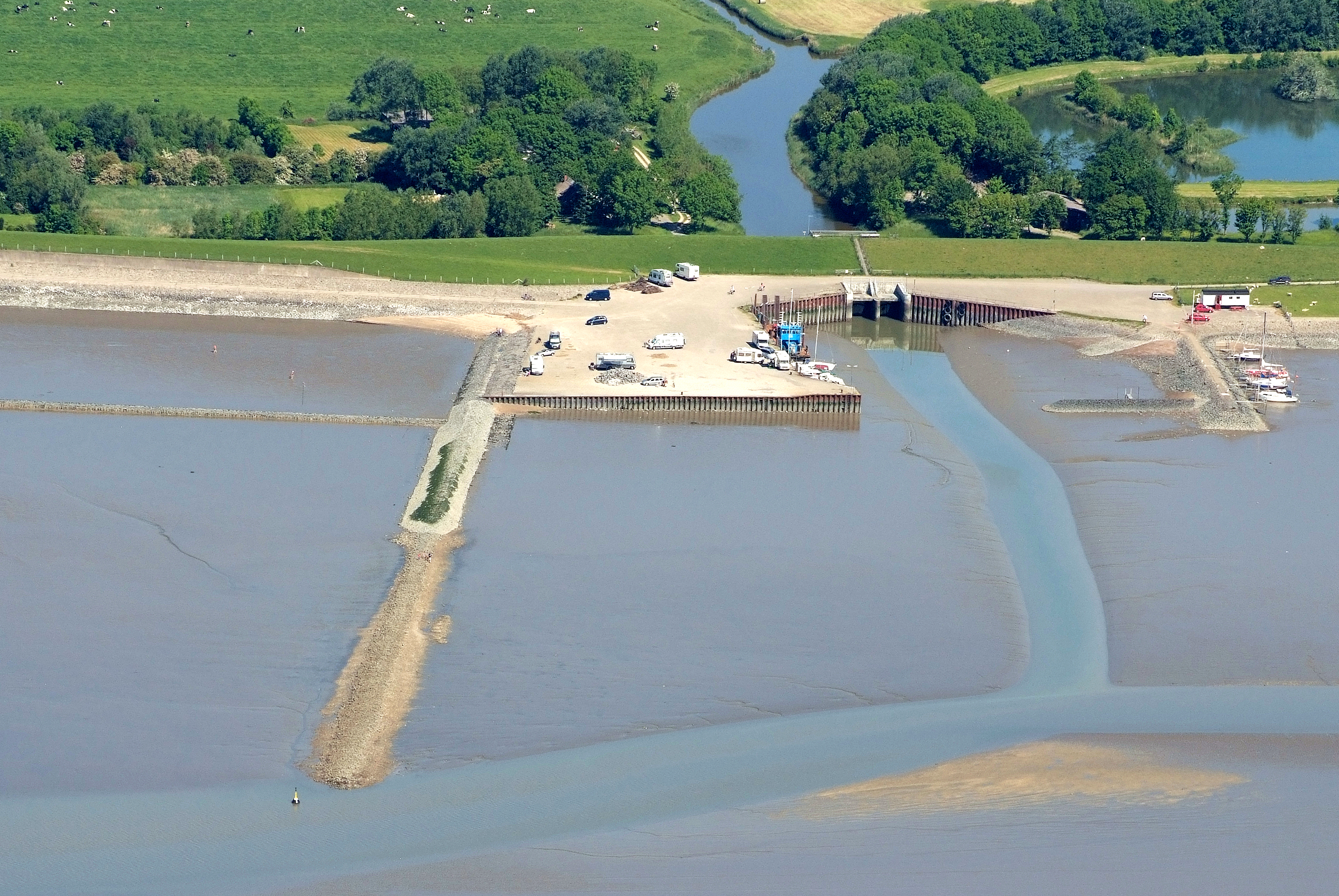 Eckwarder Siel und Sportboothafen Eckwarden Fotoflug vom Flugplatz Nordholz-Spieka über Cuxhaven und Wilhelmshaven